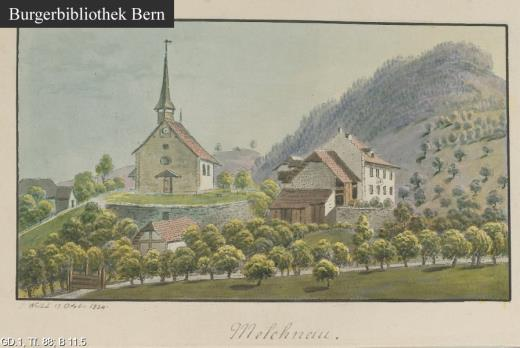 Kirche und Pfarrhaus Melchnau 1824, kolorierte Aquatinta von Jakob Samuel Weibel. Archiv der Burgergemeinde Bern.